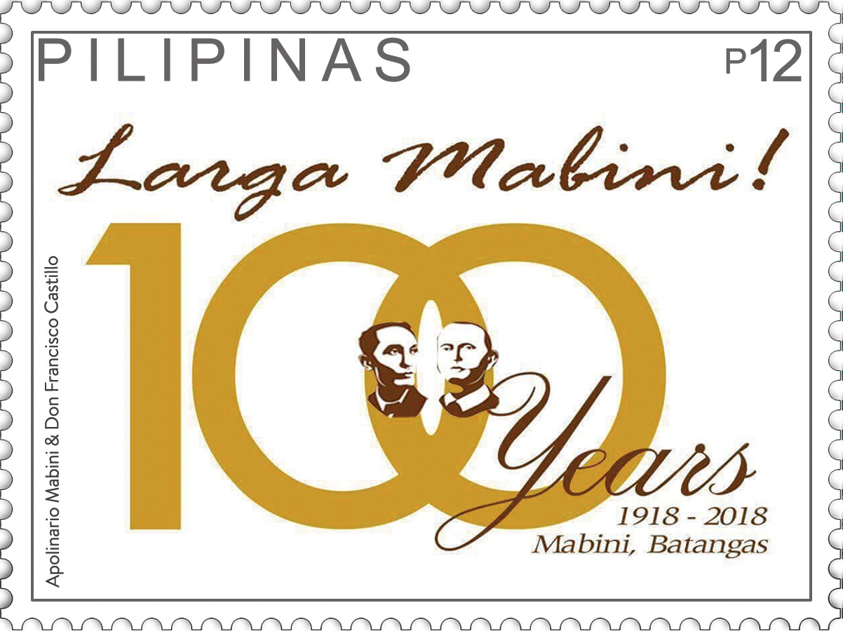 CENTENNIAL OF MABINI, BATANGAS